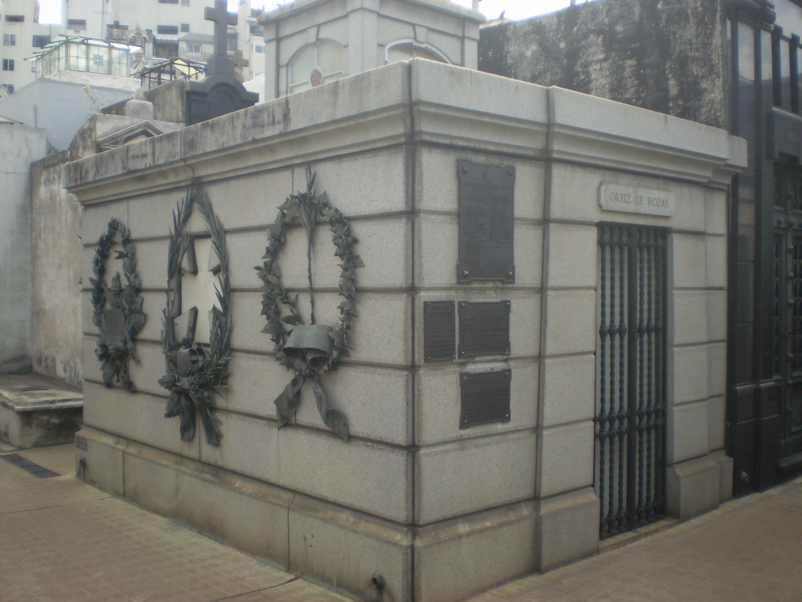 Bóveda de la familia Ortiz de Rozas donde se hallan los restos de Juan Manuel de Rosas, Cementerio de la Recoleta, Buenos Aires.